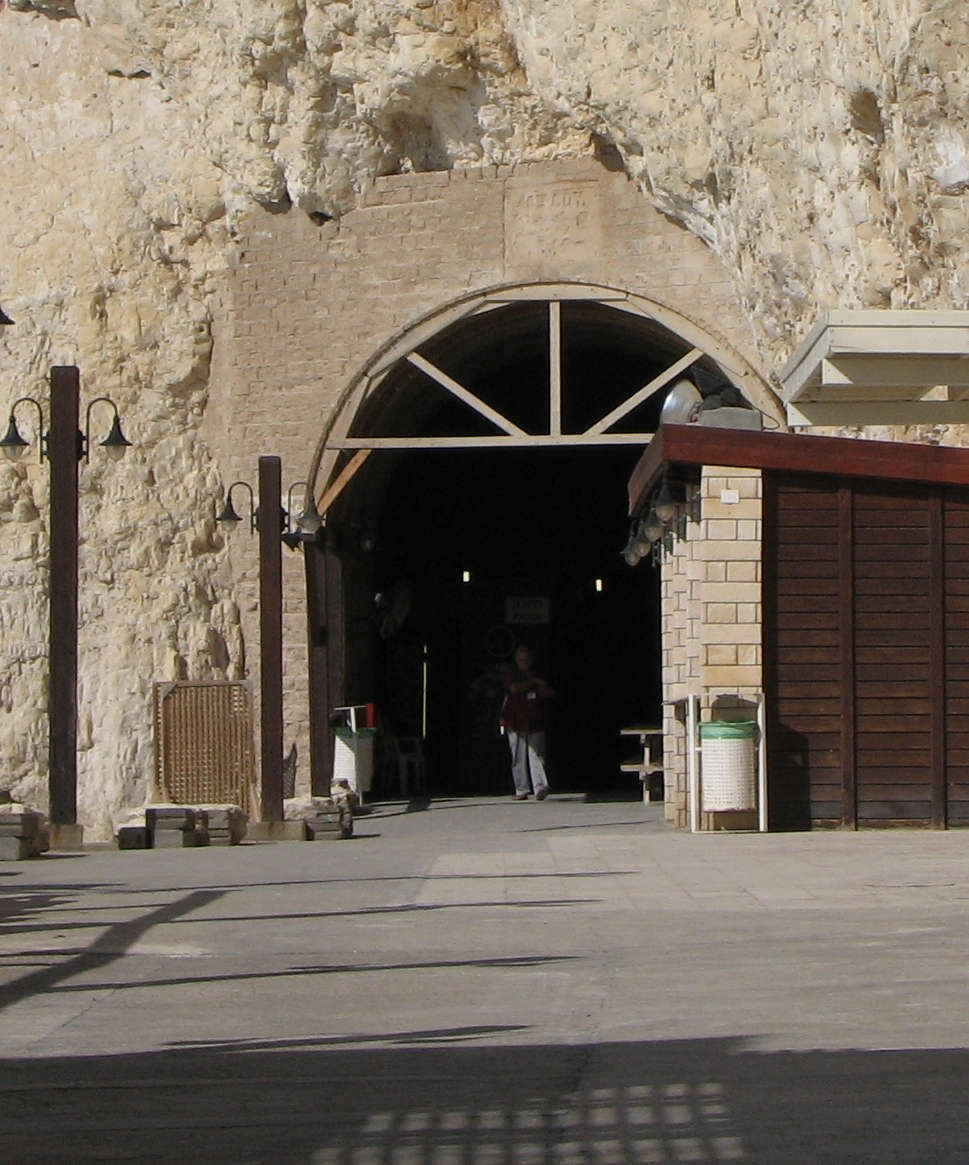 המנהרה הצפונית בראש הנקרה